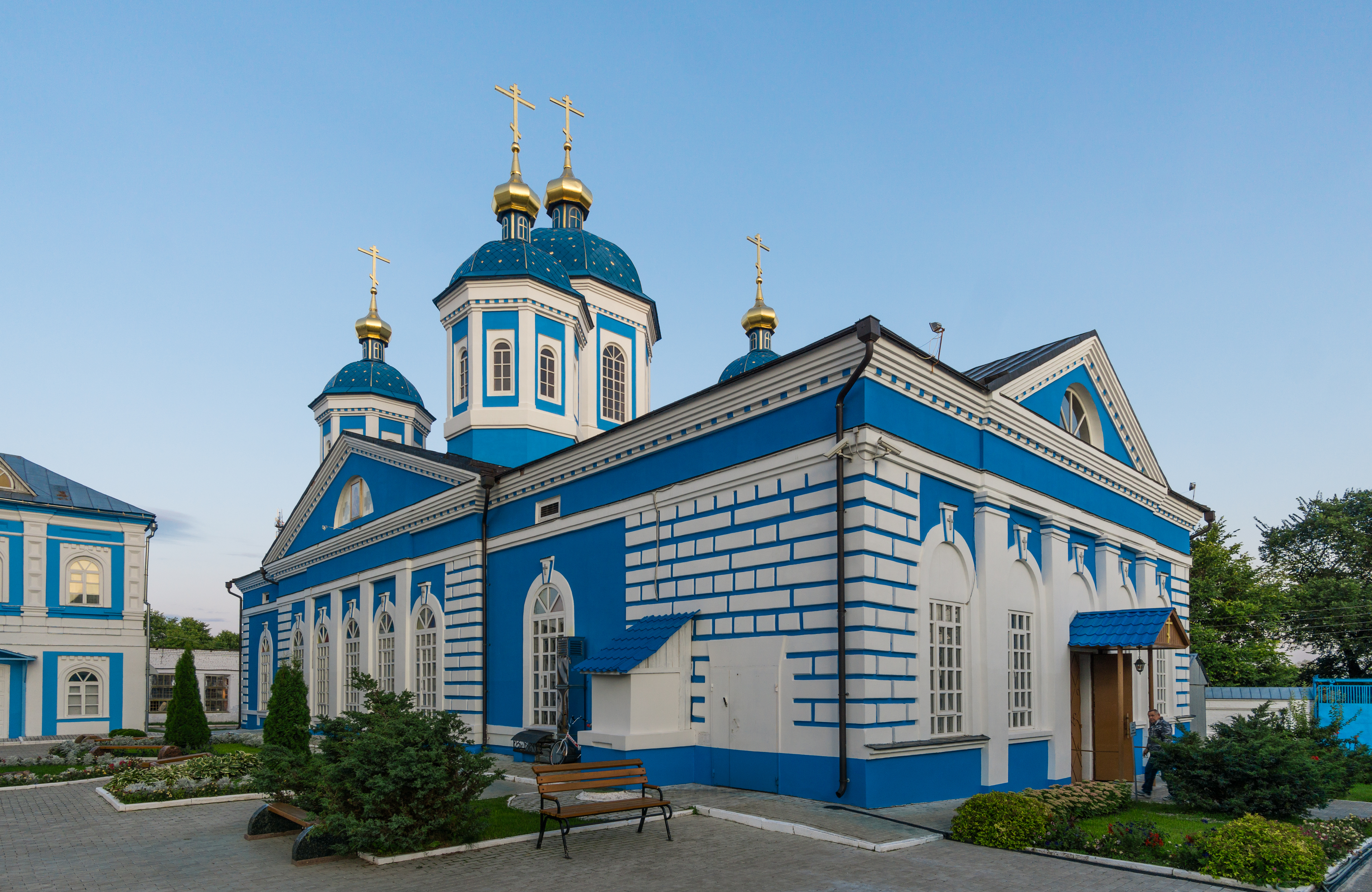 церковь Рождества Богородицы (зимняя): Оранки, Богородский район, Нижегородская область